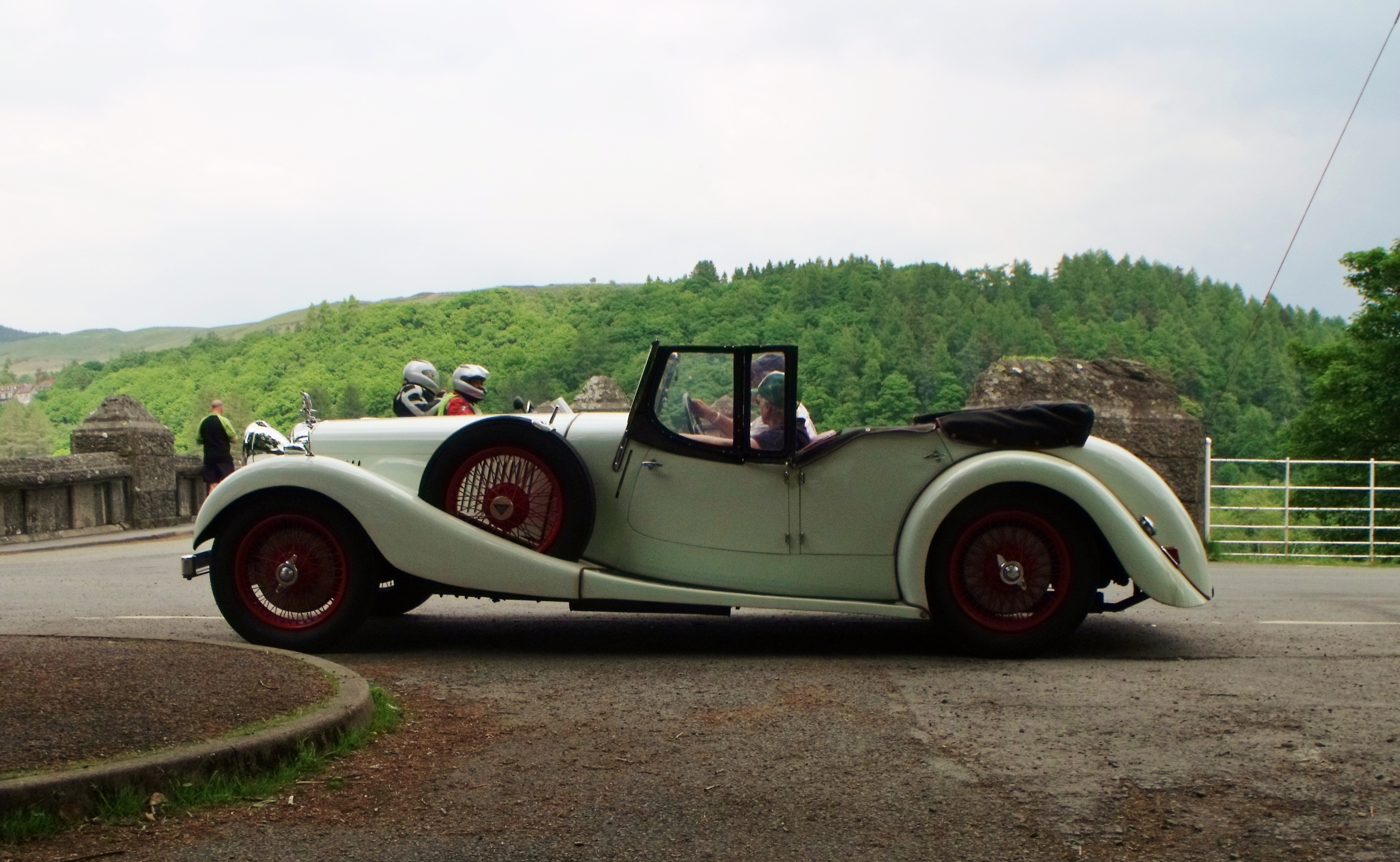 Alvis 4.3 Litre short chassis van den Plas 4-door tourer Lake Vyrnwy